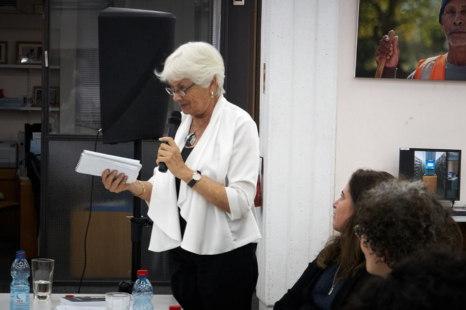 אסתר הרצוג - השקת הספר 'בשר ודמים: זנות, סחר בנשים ופורנוגרפיה בישראל' - 2013